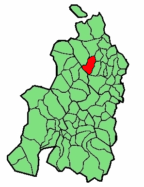 aipaturiko udalerriaren kokapena Nafarroa Beherean